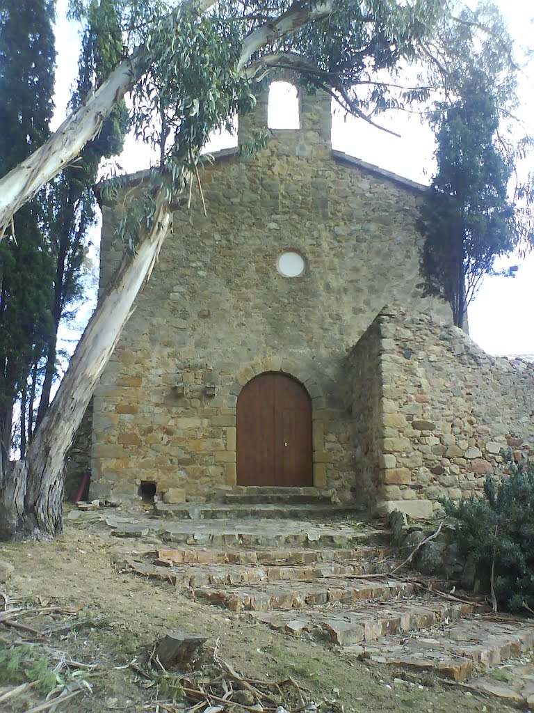 Monasteri sant maria del mar - collet sant antoni calonge